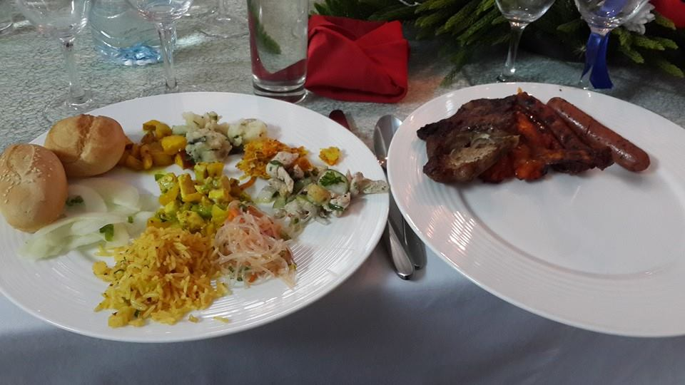 Achard légumes